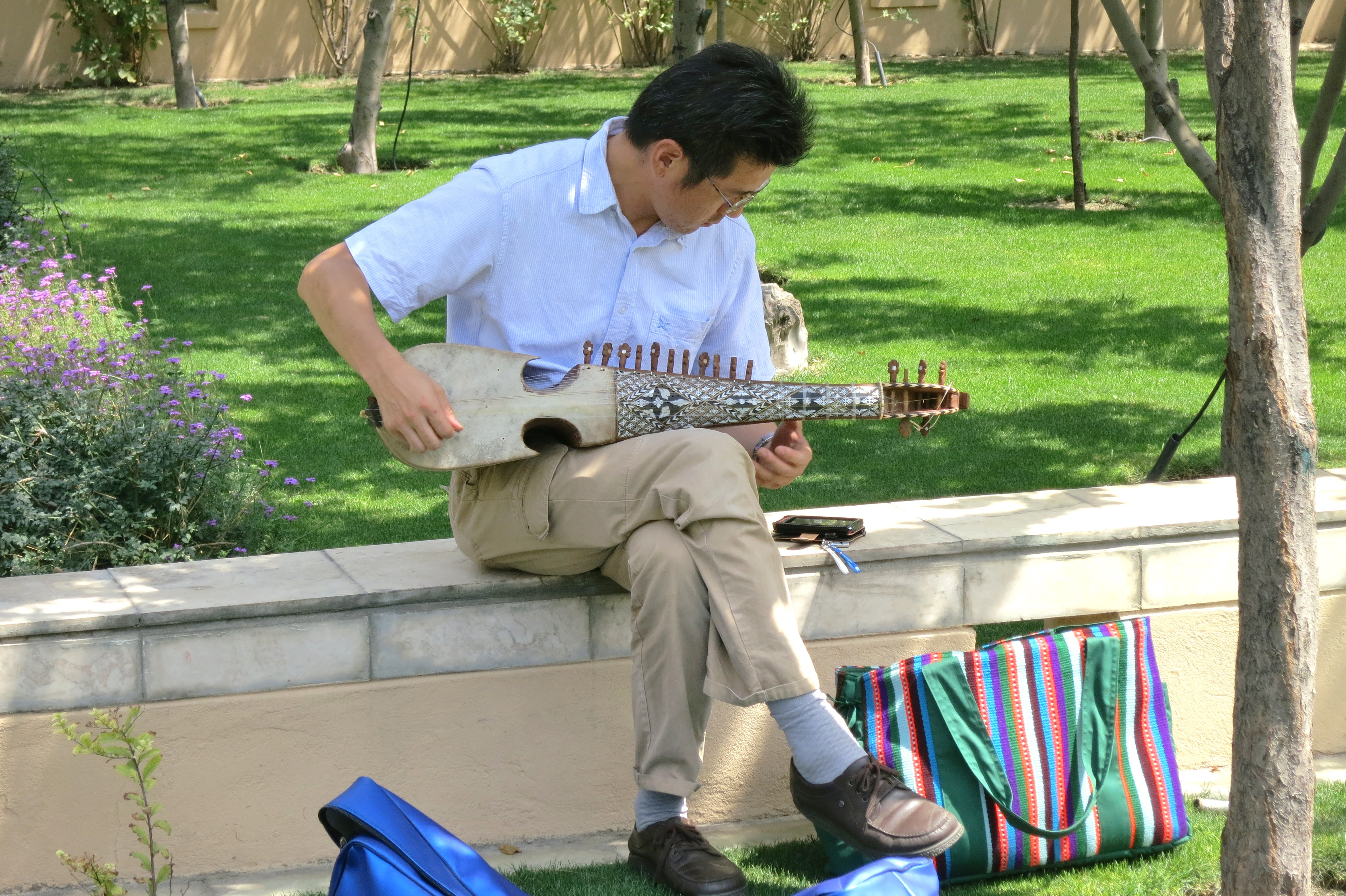 Kabul, Afghanistan